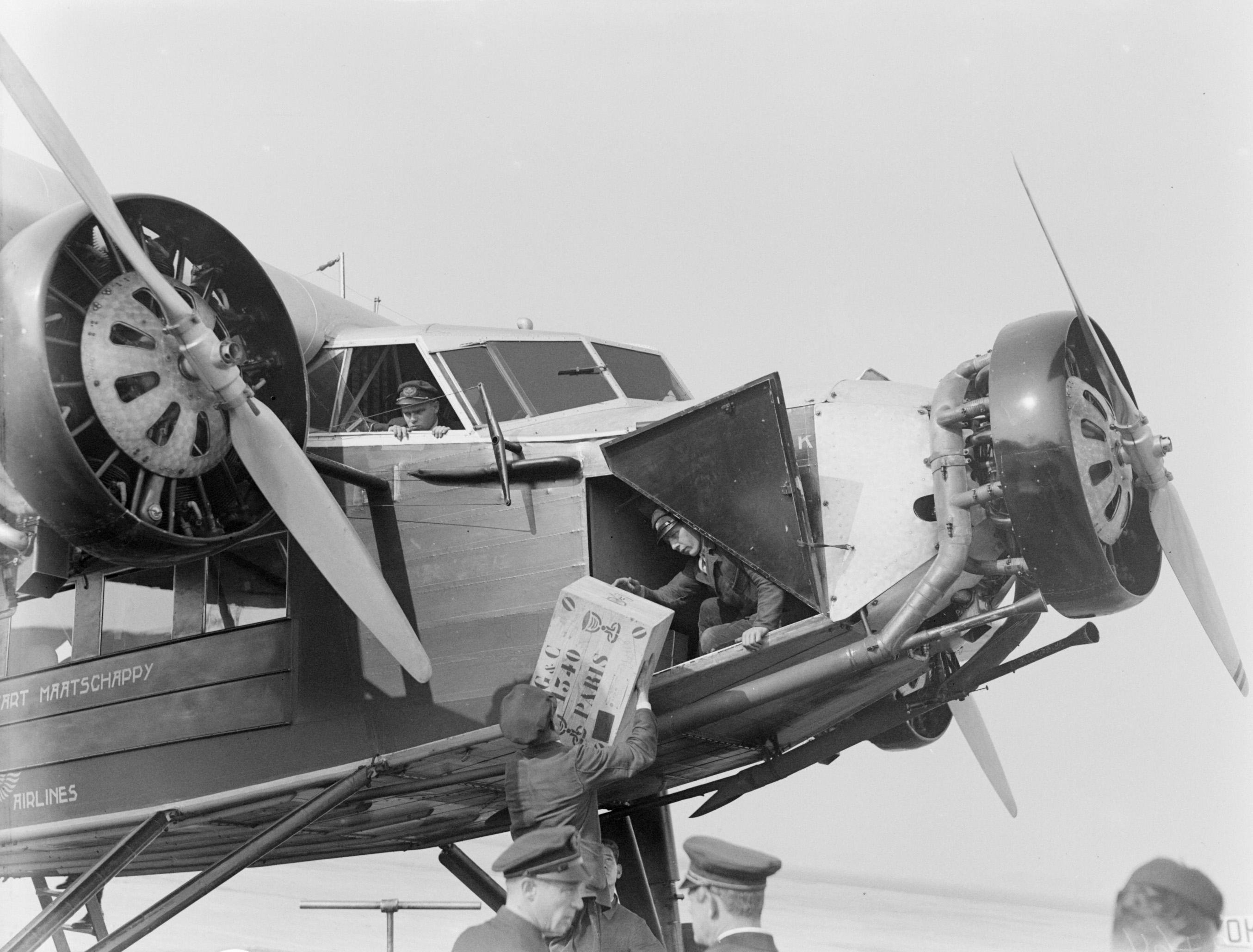 Collectie / Archief : Fotocollectie Van de Poll Reportage / Serie : Reportage Schiphol Beschrijving : KLM vliegtuig op Schiphol Annotatie : Waarschijnlijk de "Leeuwerik". Een houten kist met opschrift G&C 1340 Paris wordt in de neus van het vliegtuig geladen of uitgeladen Datum : 1933 Locatie : Amsterdam, Noord-Holland Trefwoorden : luchtvaart, vliegtuigen, vliegvelden Instellingsnaam : Schiphol Fotograaf : Poll, Willem van de, [onbekend] Auteursrechthebbende : Nationaal Archief Materiaalsoort : Glasnegatief Nummer archiefinventaris : bekijk toegang 2.24.14.02 Bestanddeelnummer : 189-0841